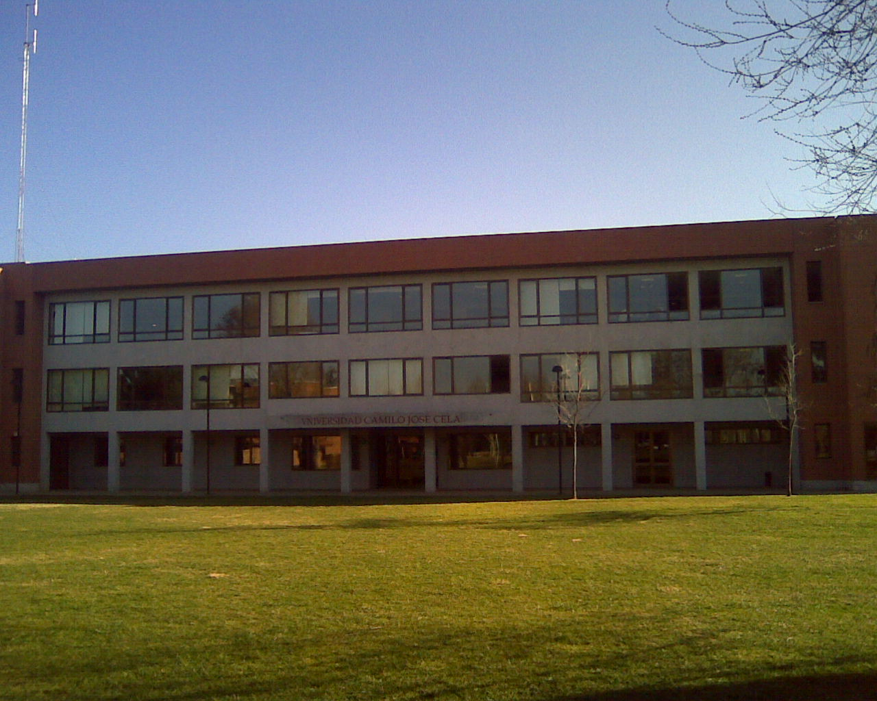 Fotografía del Edificio A de la Universidad Camilo José Cela, Madrid.